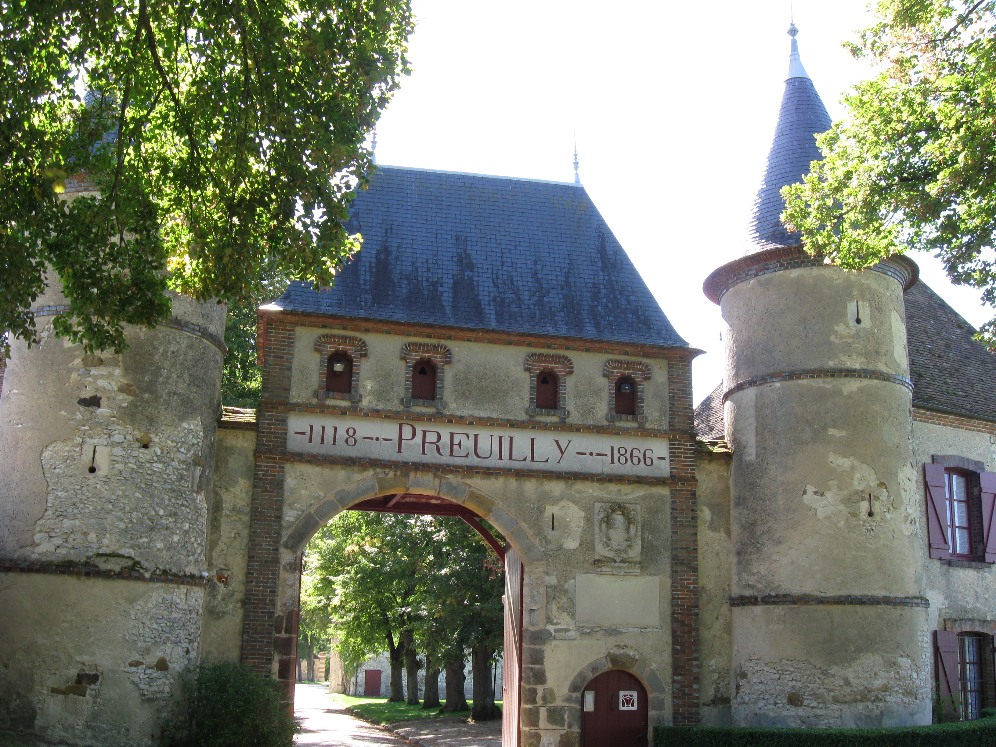 Abbaye de Preuilly (commune d'Égligny, Seine-et-Marne, région Île-de-France).